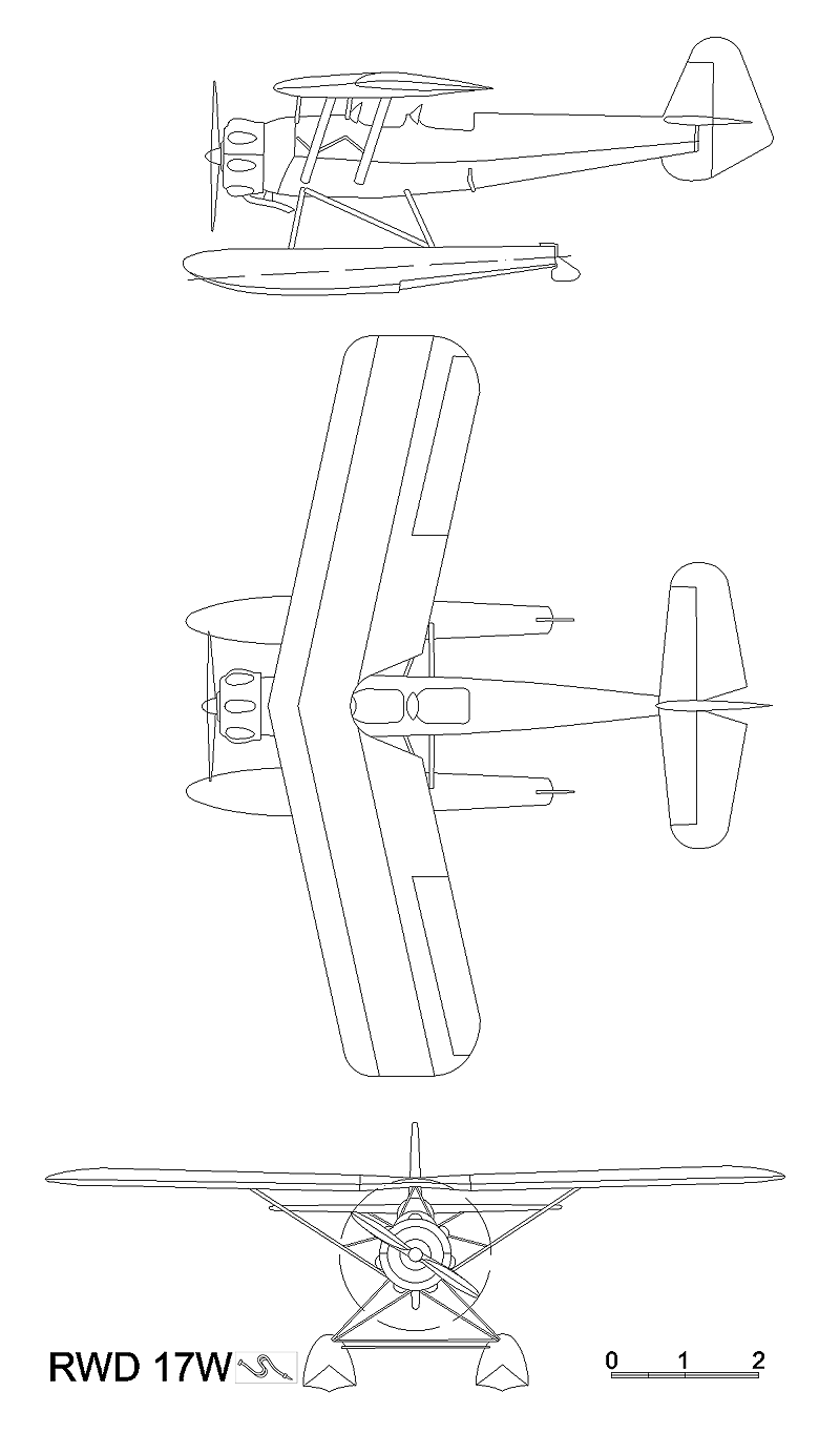 Sylwetka samolotu RWD 17W